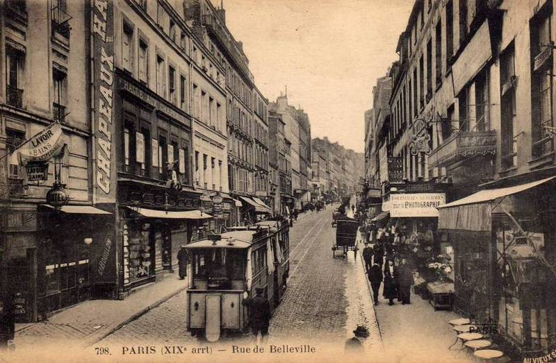 Tramway de Belleville. Paris (XIXe arrondissement), rue de Belleville.